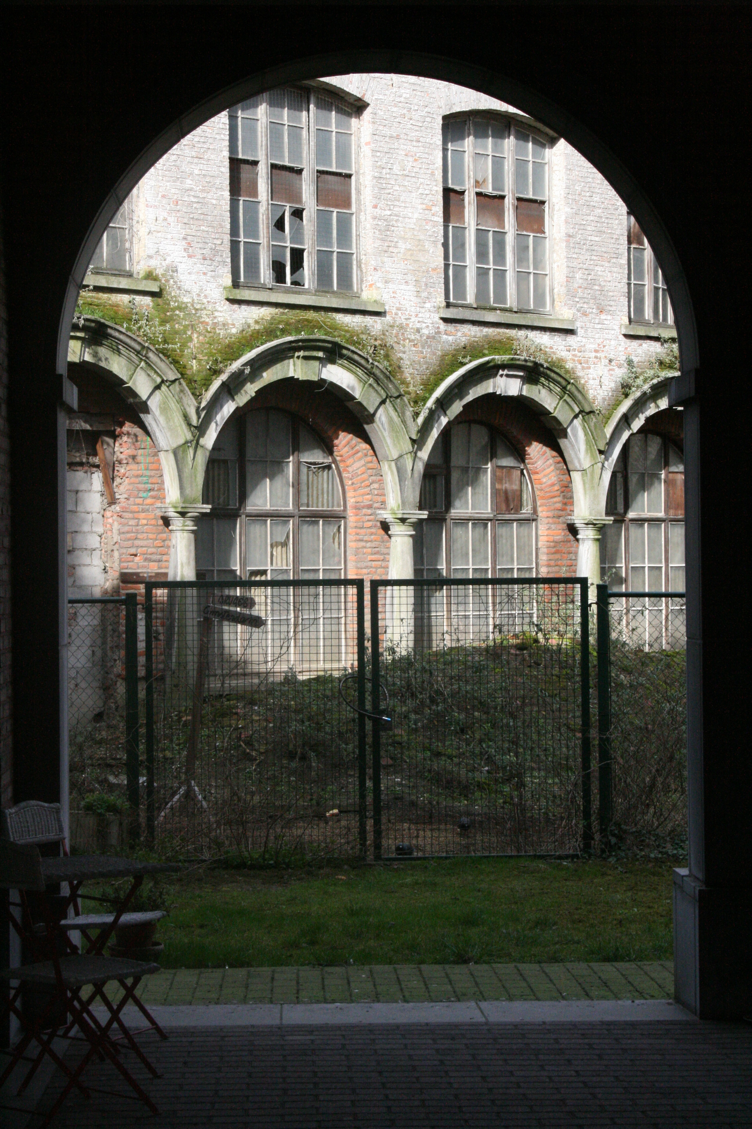 Place de la Vieille Halle aux Blés, Bruxelles (Belgique). Les arcades sont les seuls restes de l'auberge "De spaanse Kroon", jadis départ de diligences